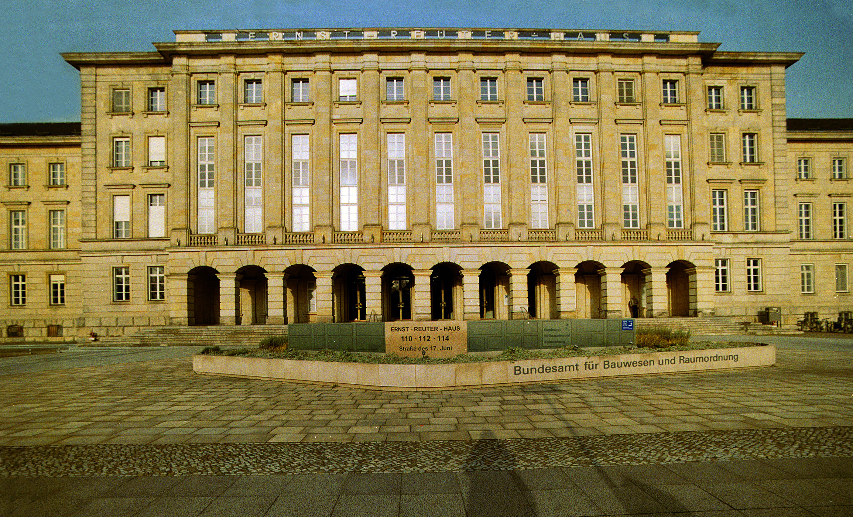 Ernst-Reuter-Haus, Berlin, Frontalansicht. Januar 2018.